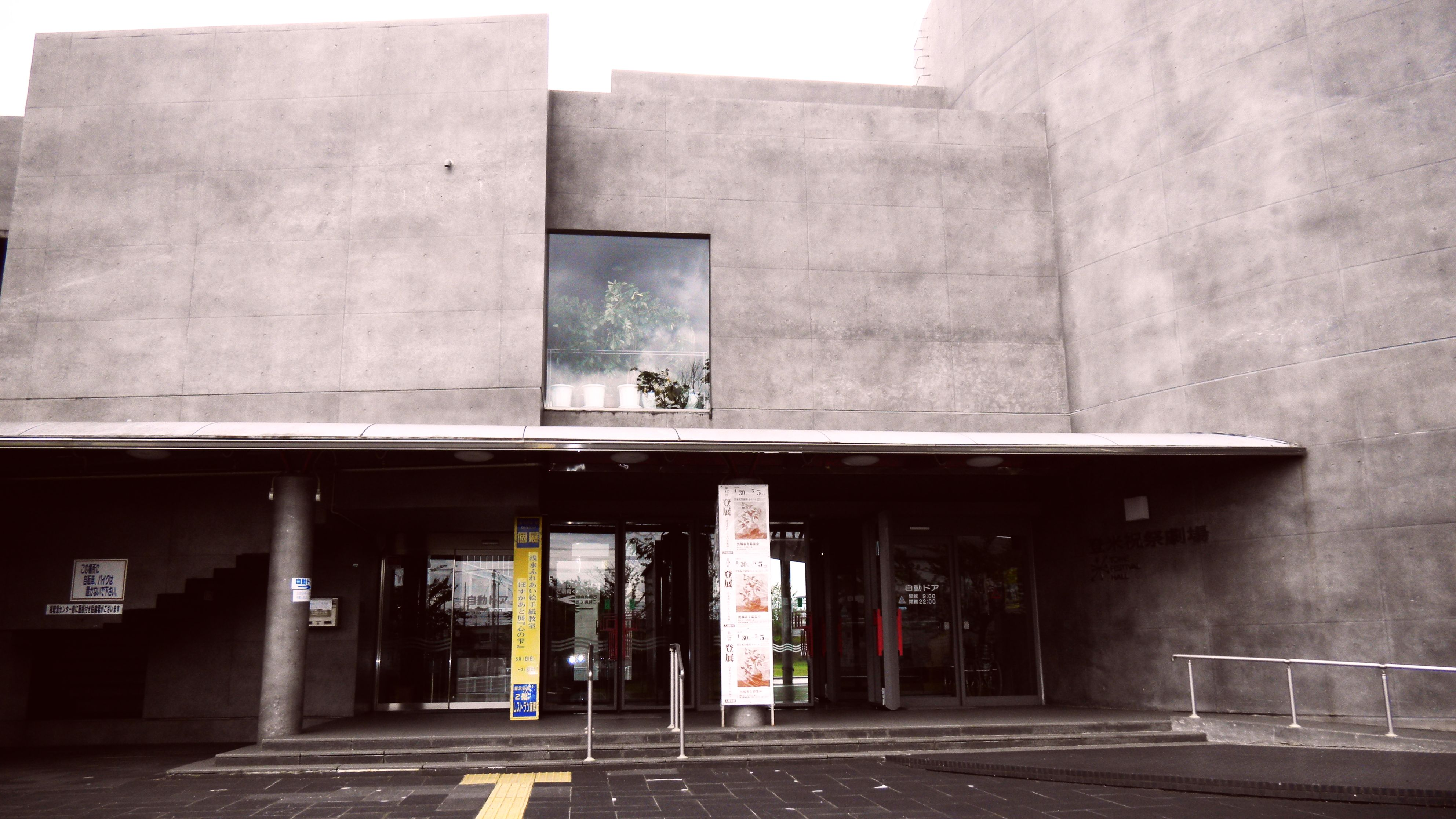 登米祝祭劇場の「登米市民ふれあい美術展」